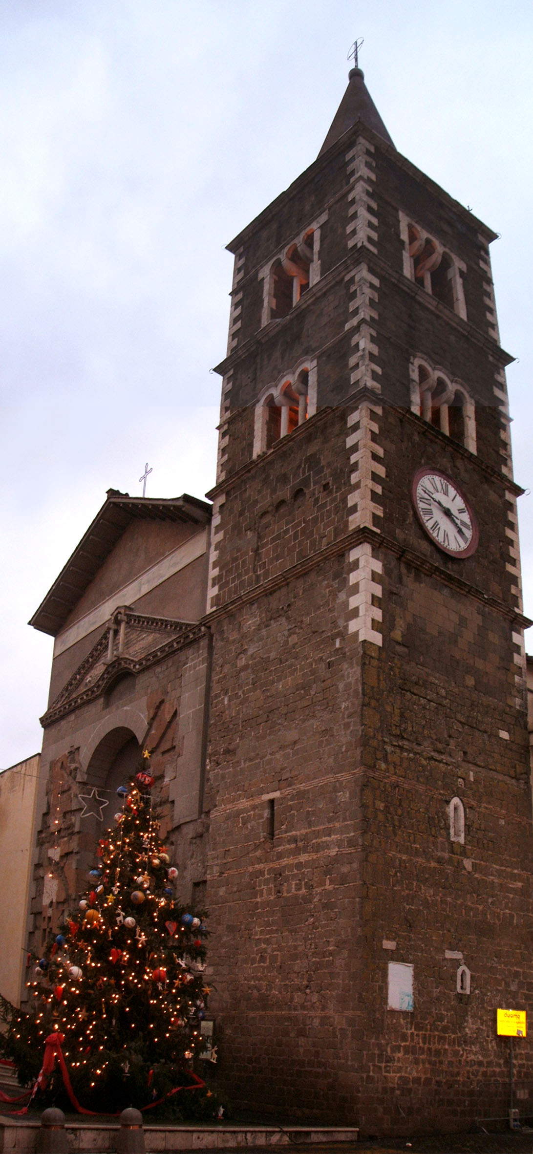 Palestrina, Roma, Duomo